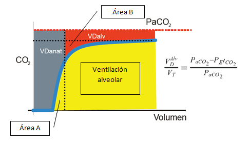 capnograma volumetrico estandar